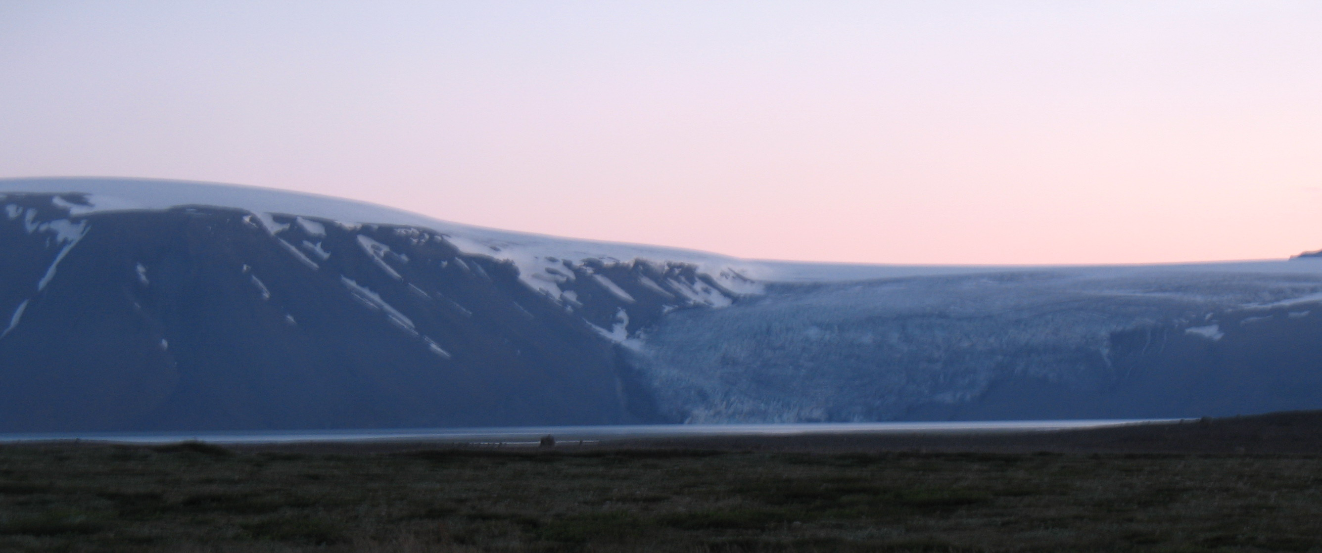 Lake Hvítarvátn